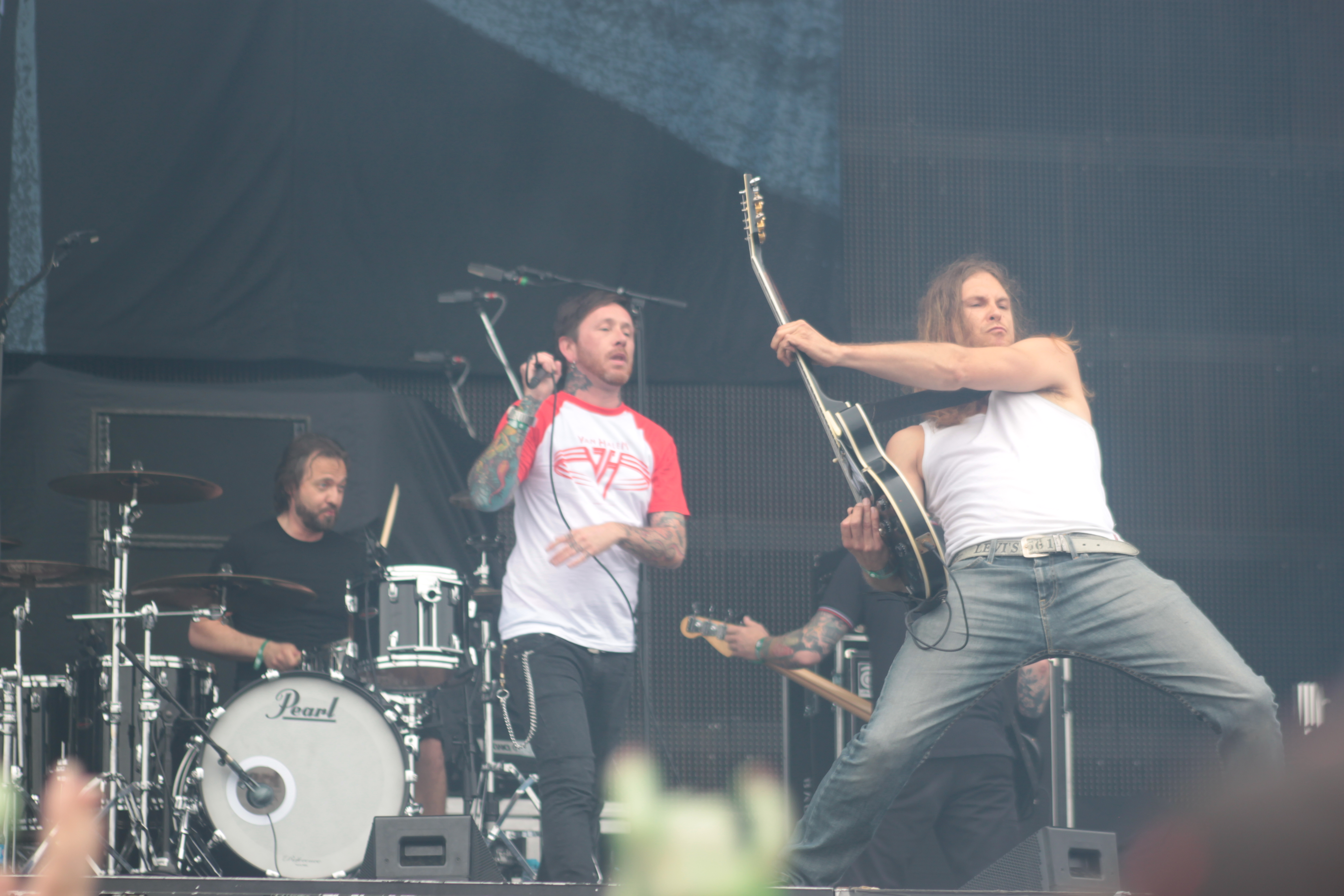 Audrey Horne, Helfest 2013, Fr-44-Clisson.